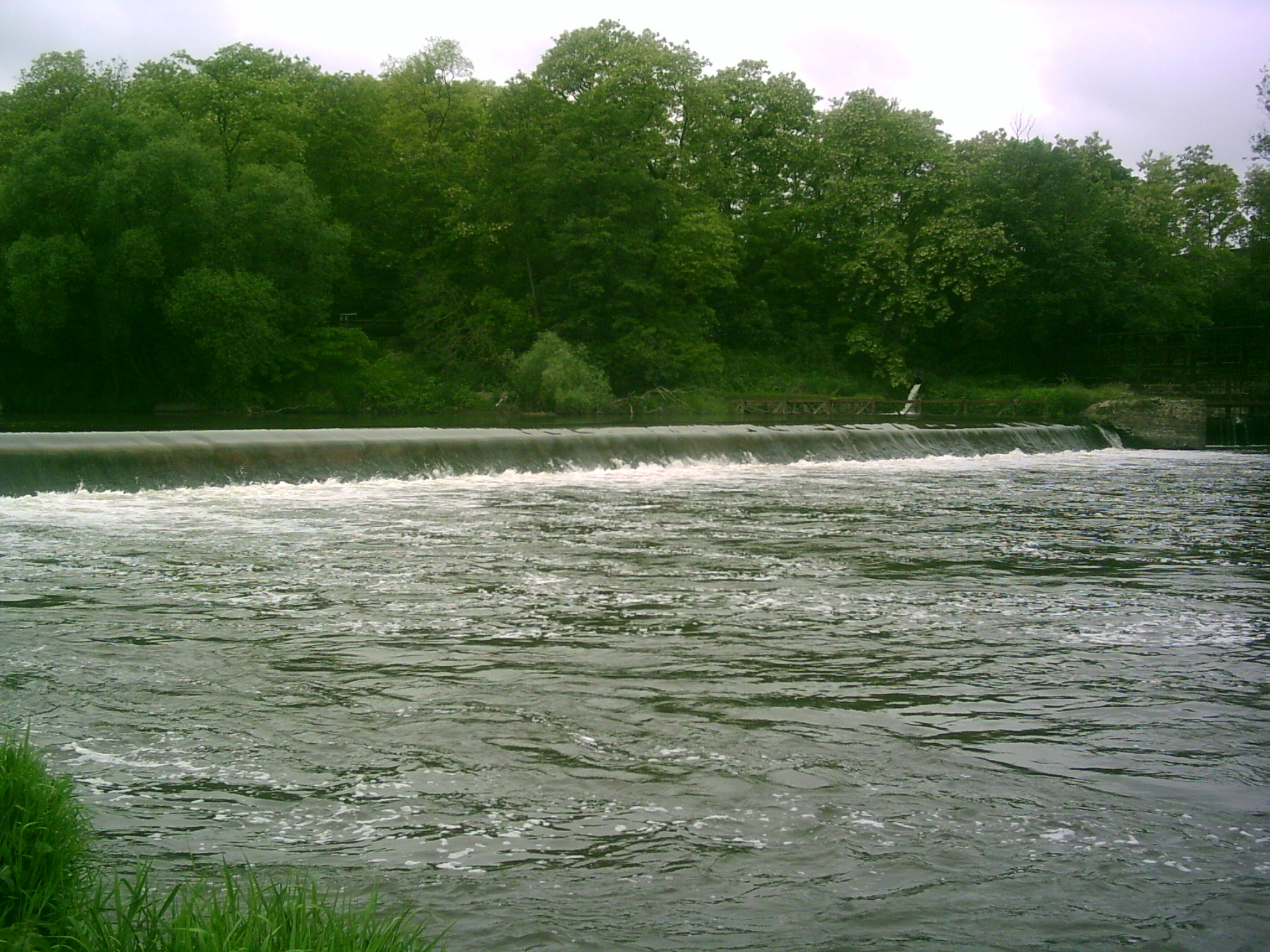 The Wehr Trebsen (Trebsen) on river Mulde